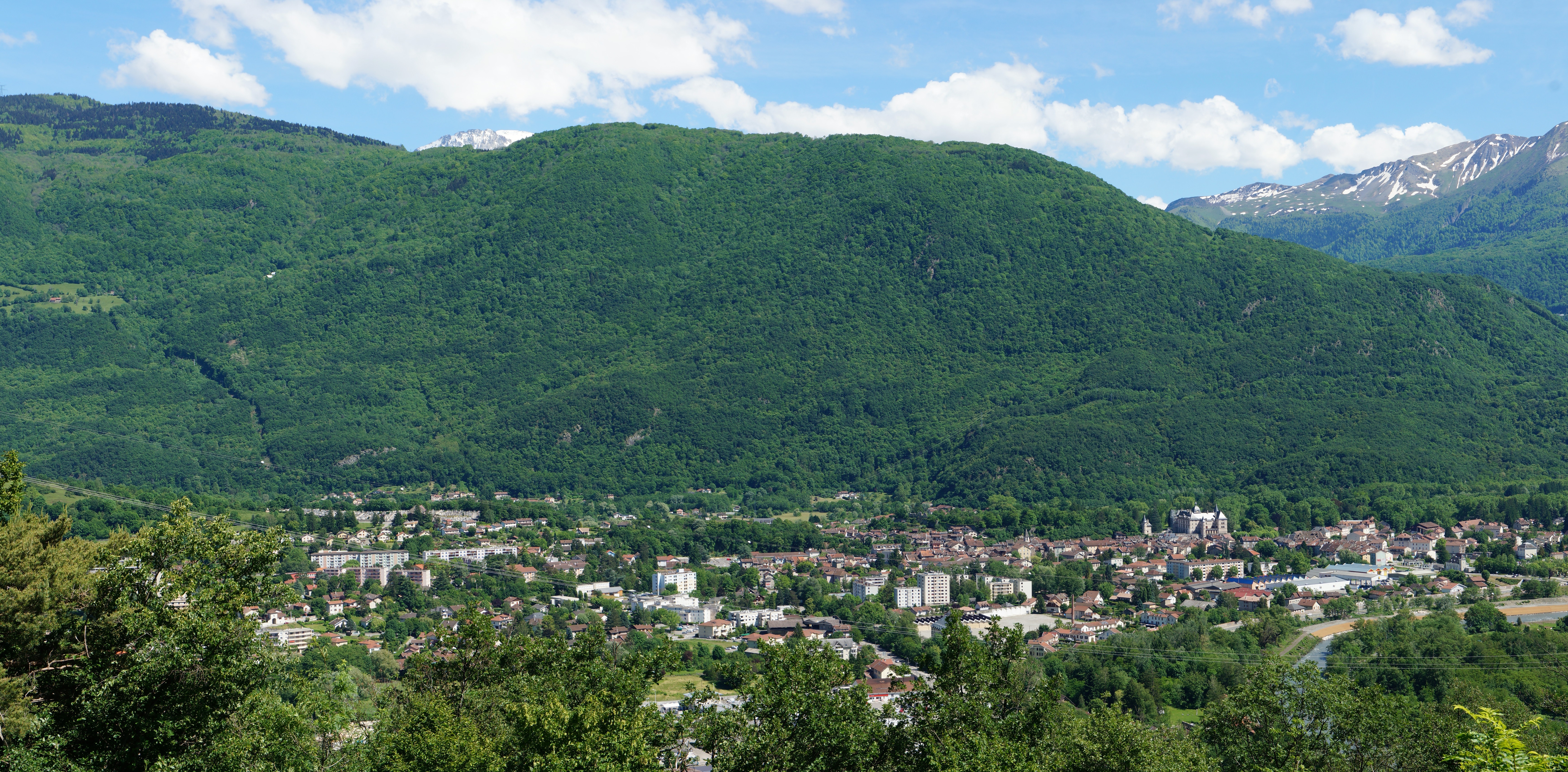 Vizille vue du chemin de la Croix de la Vue à Montchaboud